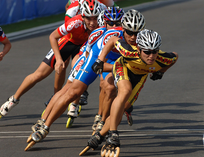 13届亚洲轮滑锦标赛